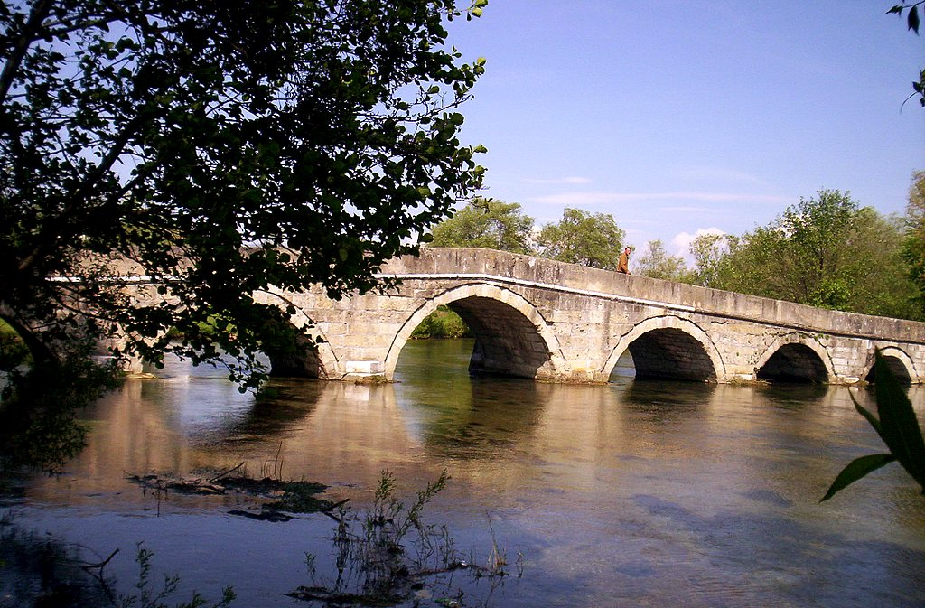 Rimski most pored Sarajeva. Fotografija je snimljena 12. Maja 2006 godine u 14 sati sa juÅ¾ne strane.